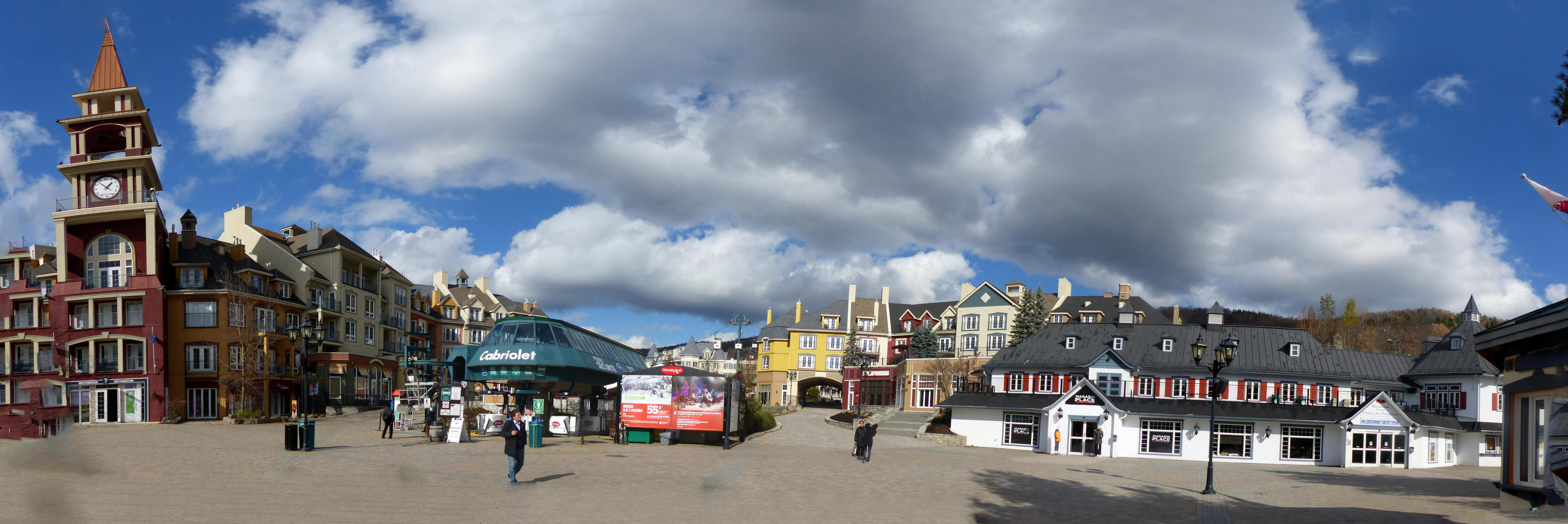 Mont-Tremblant - Québec – Canada - Panorama